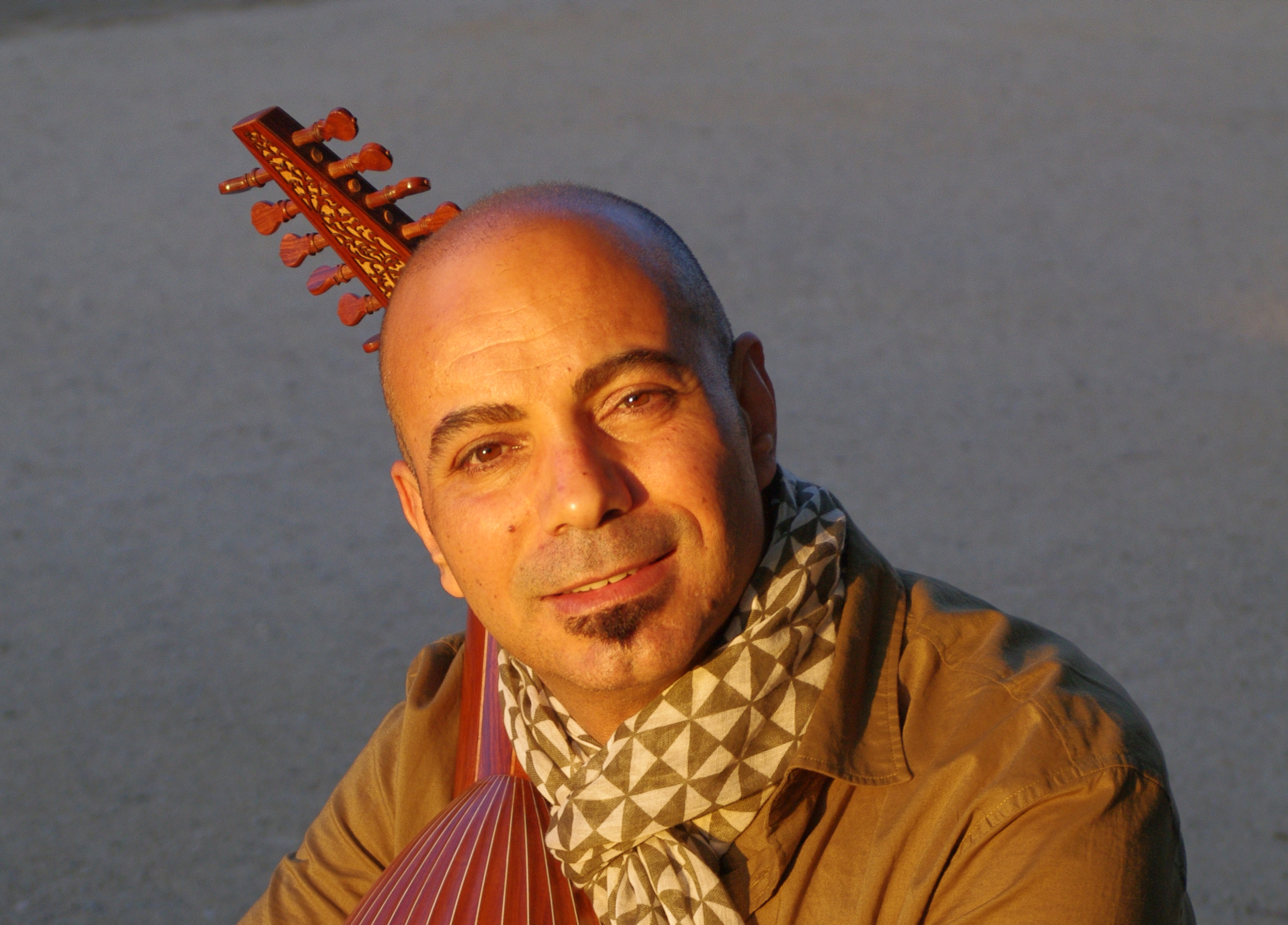 Moneim Adwan - portrait 2016